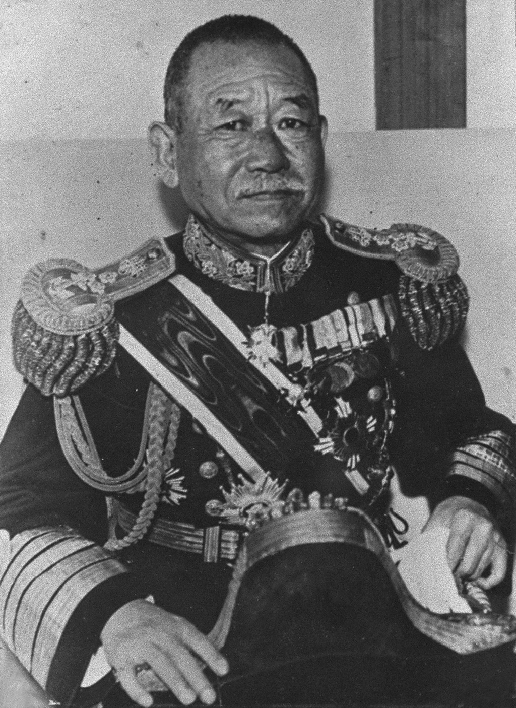 Portrait of Okada Keisuke (岡田啓介, 1868 – 1952)